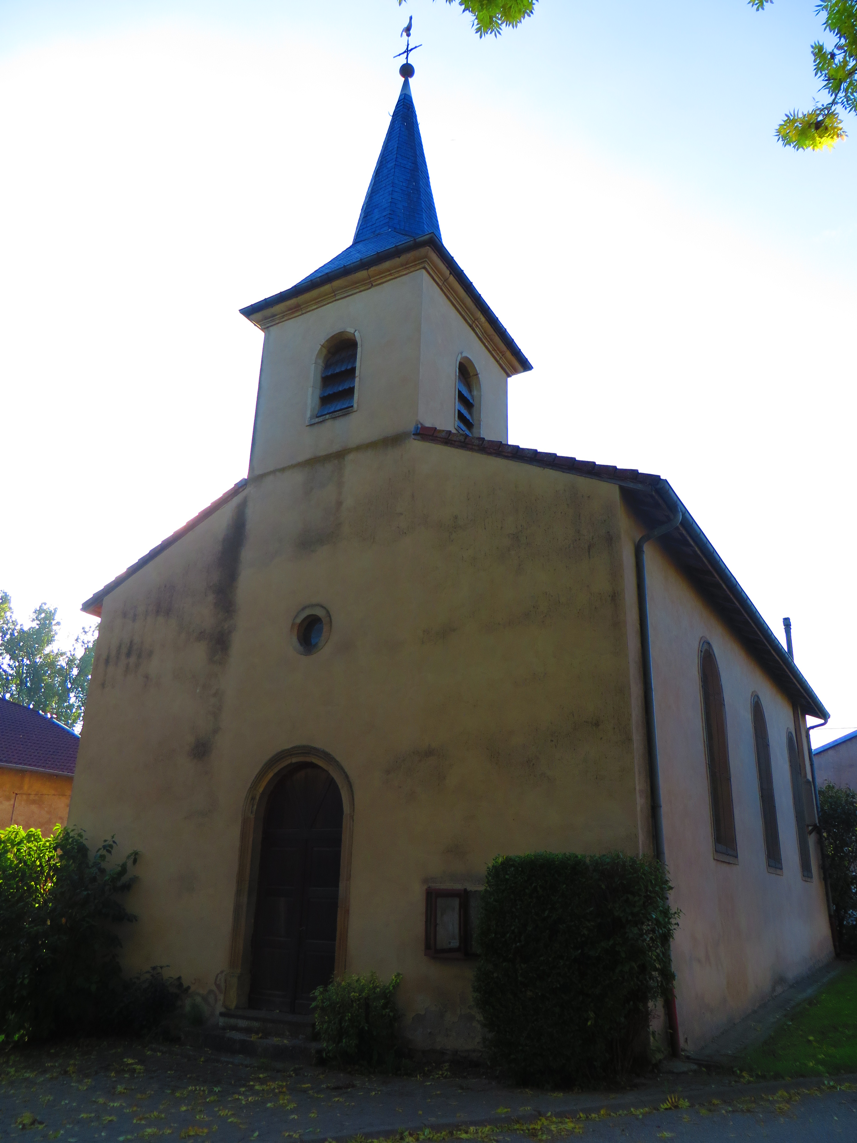 Obreck l'église Saint-Clément